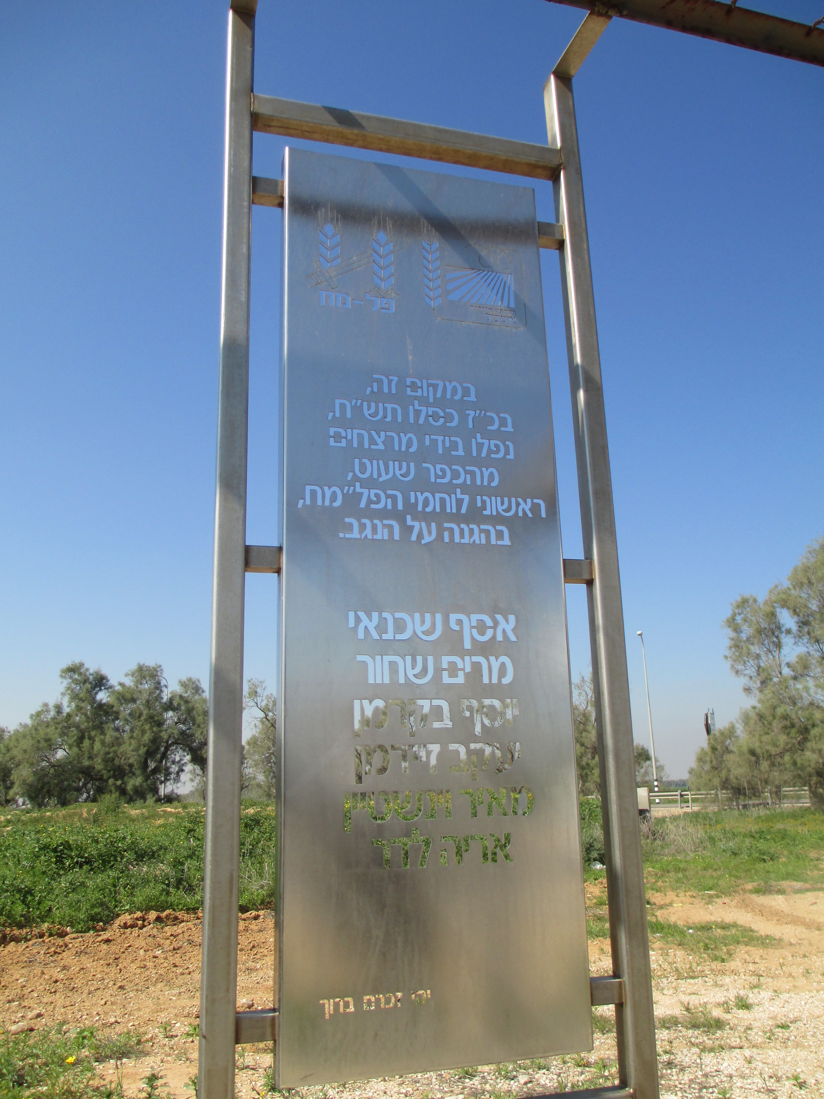 אנדרטה בצומת גבולות (שועוט) ל-6 לוחמי פלמ"ח שנהרגו שם ב-9/12/47